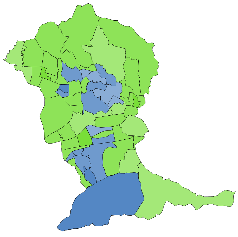 顏色對照表